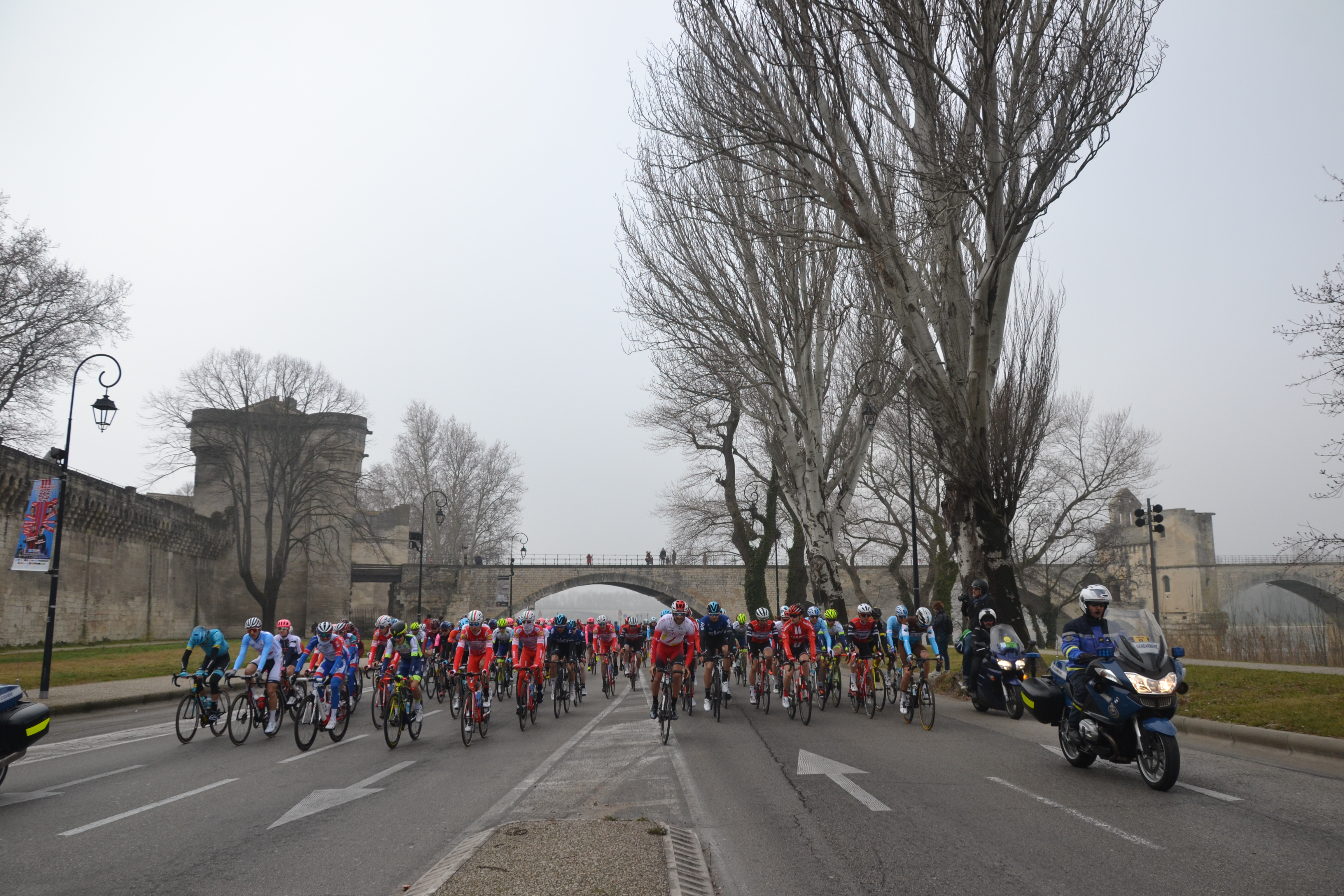 Peloton le long du Rhône